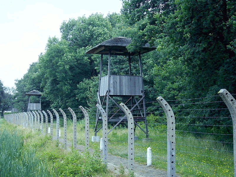 Nationaal monument kamp Vught, Wachttoren